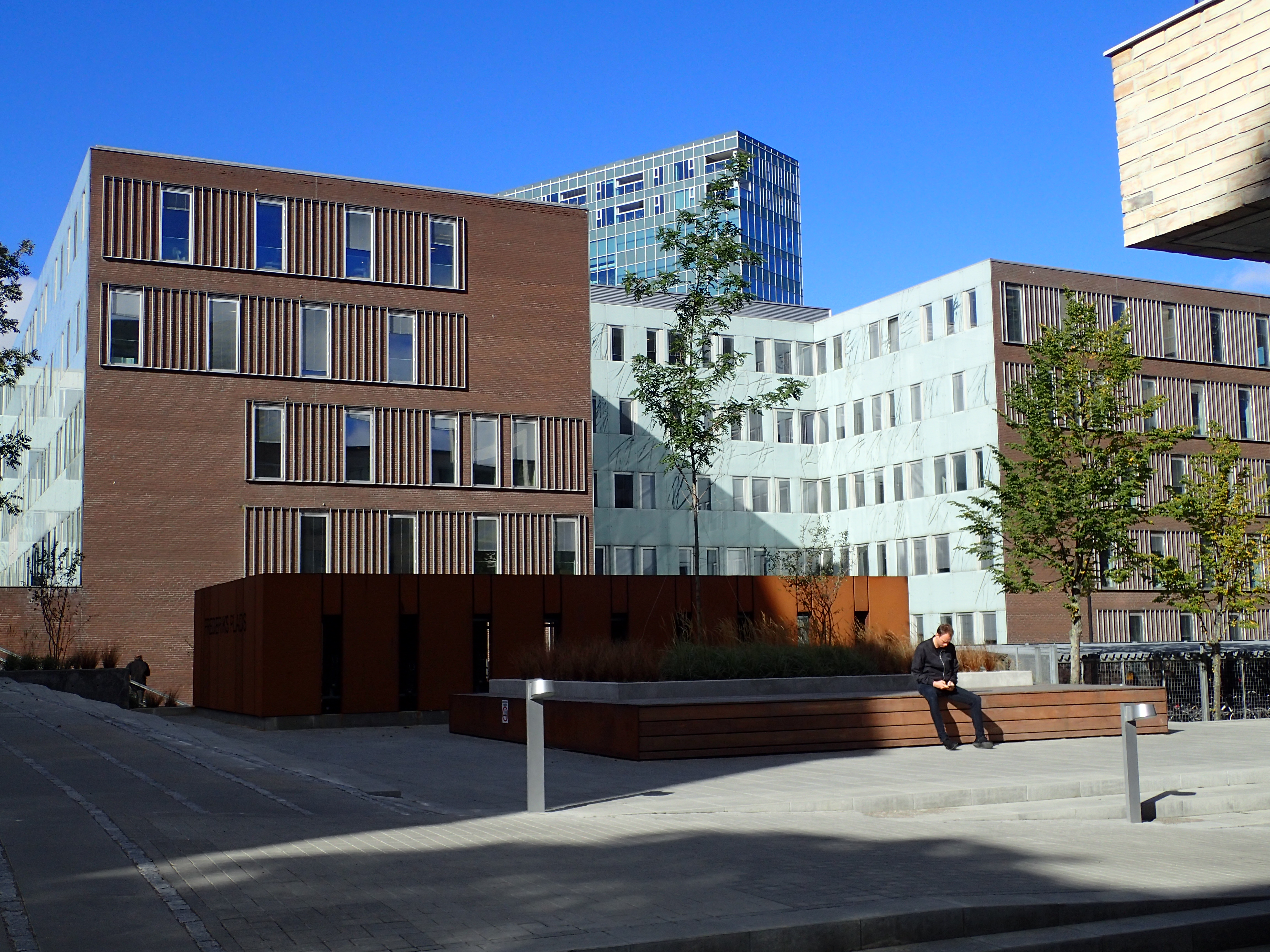 Udkik mod Jægergården fra Frederiks Plads.